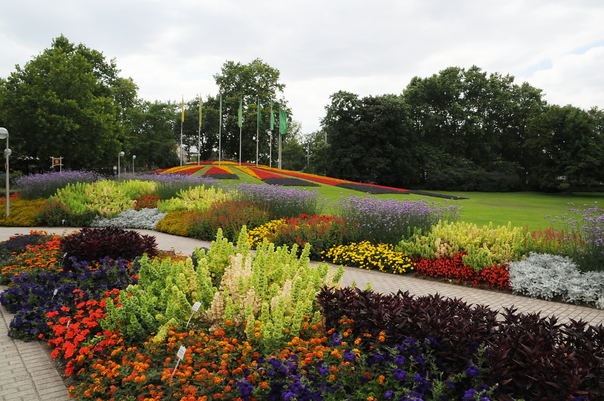 Luisenpark Mannheim, Mannheim, Rheinland-Pfalz, Deutschland